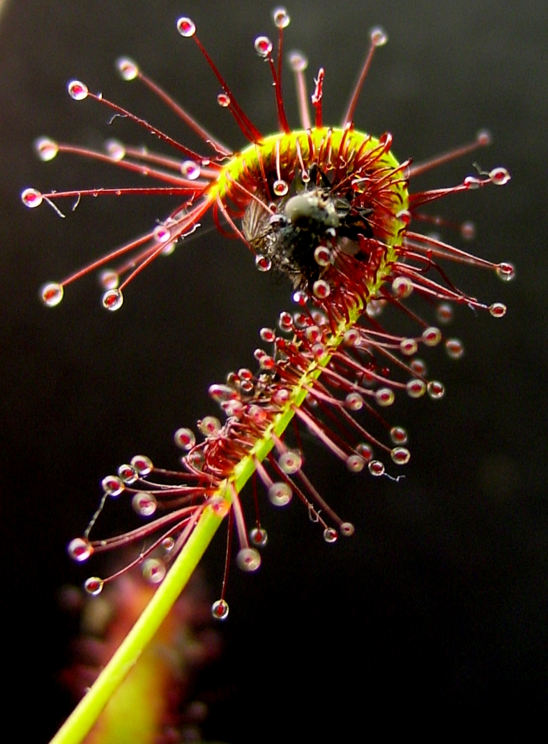 a plant